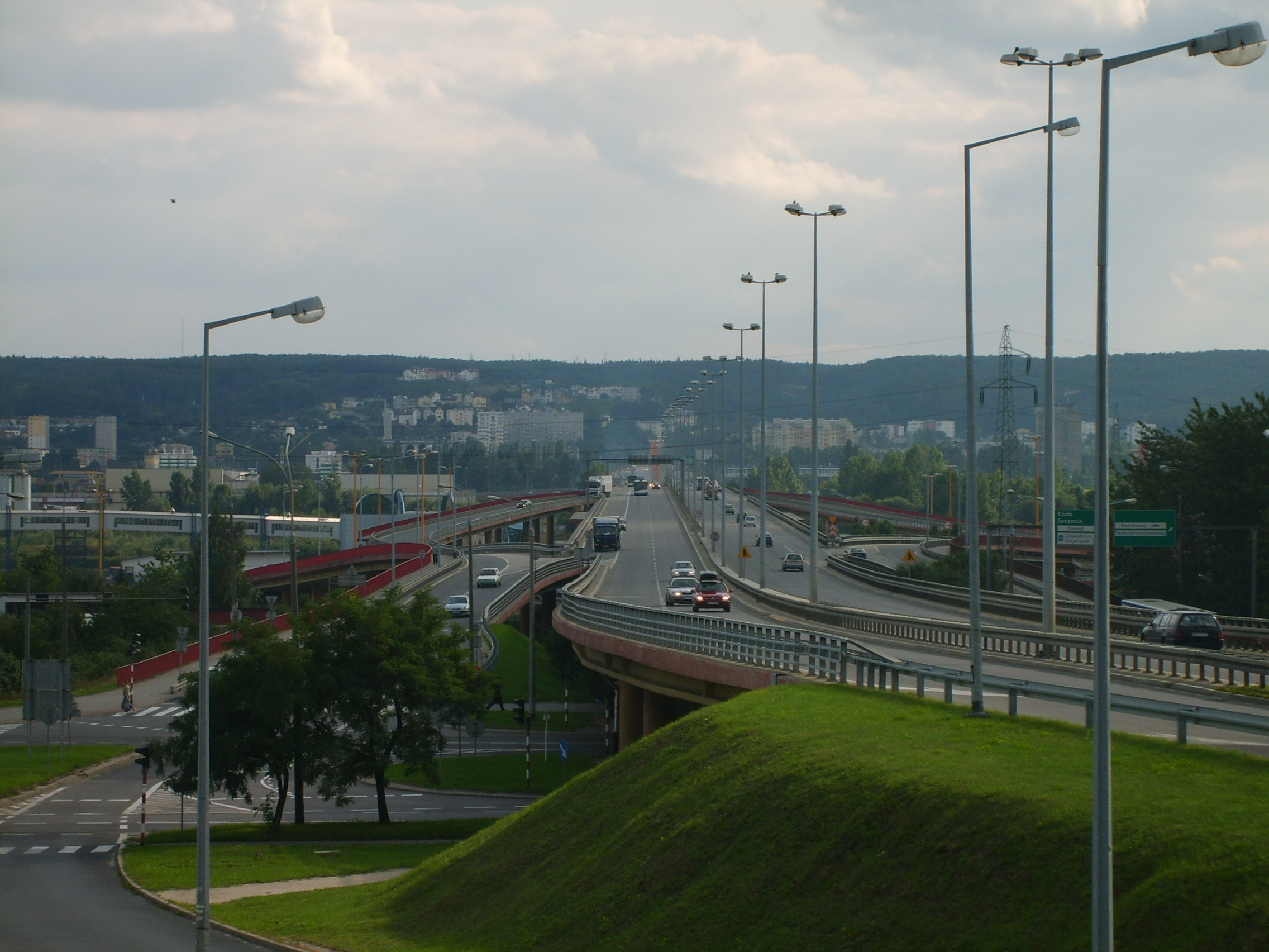 Trasa im. Eugeniusza Kwiatkowskiego od strony Obłuża.